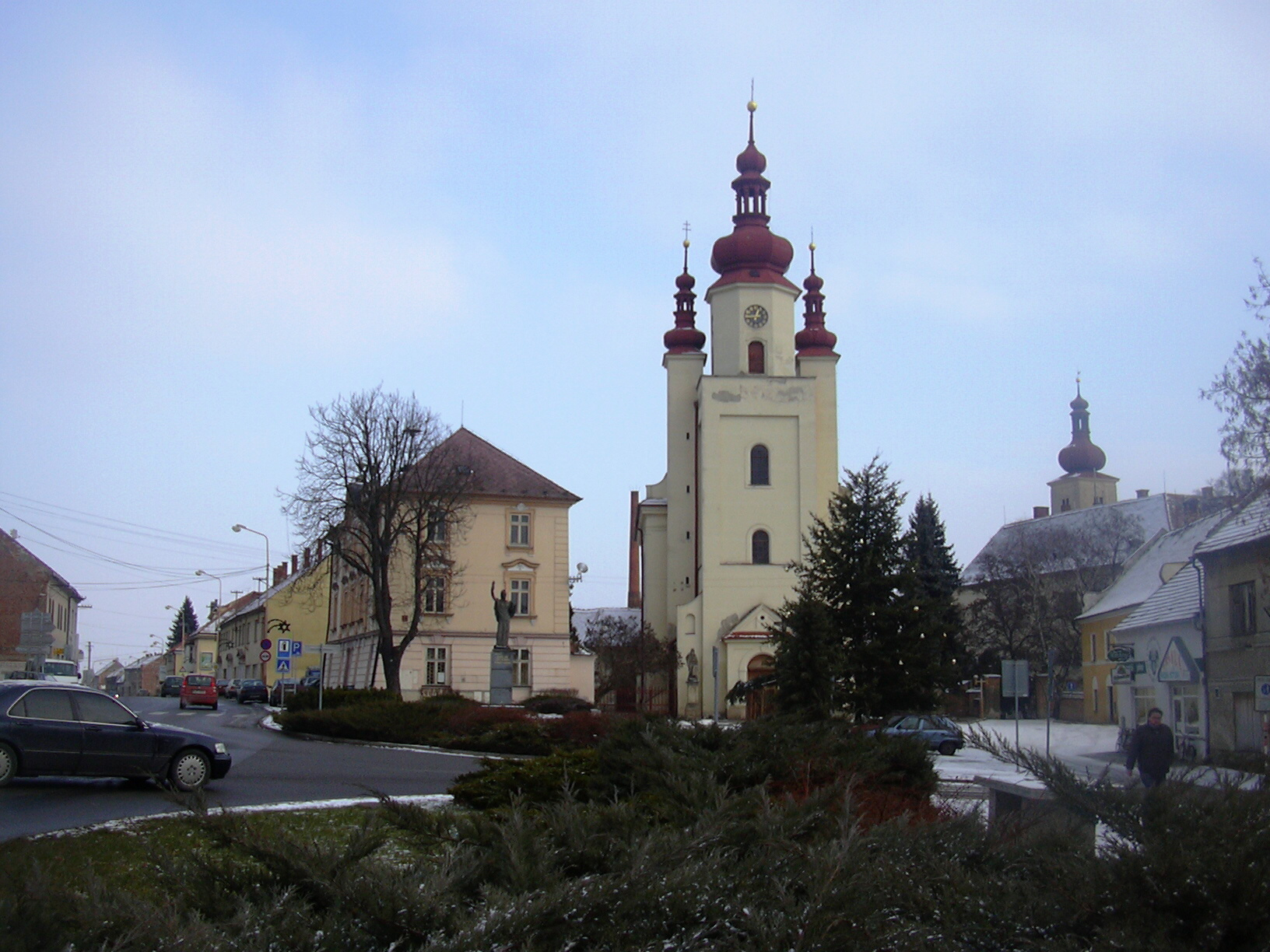 Palacké náměstí s Farním kostelem sv. Ondřeje (Ivanovice na Hané- czech republic)